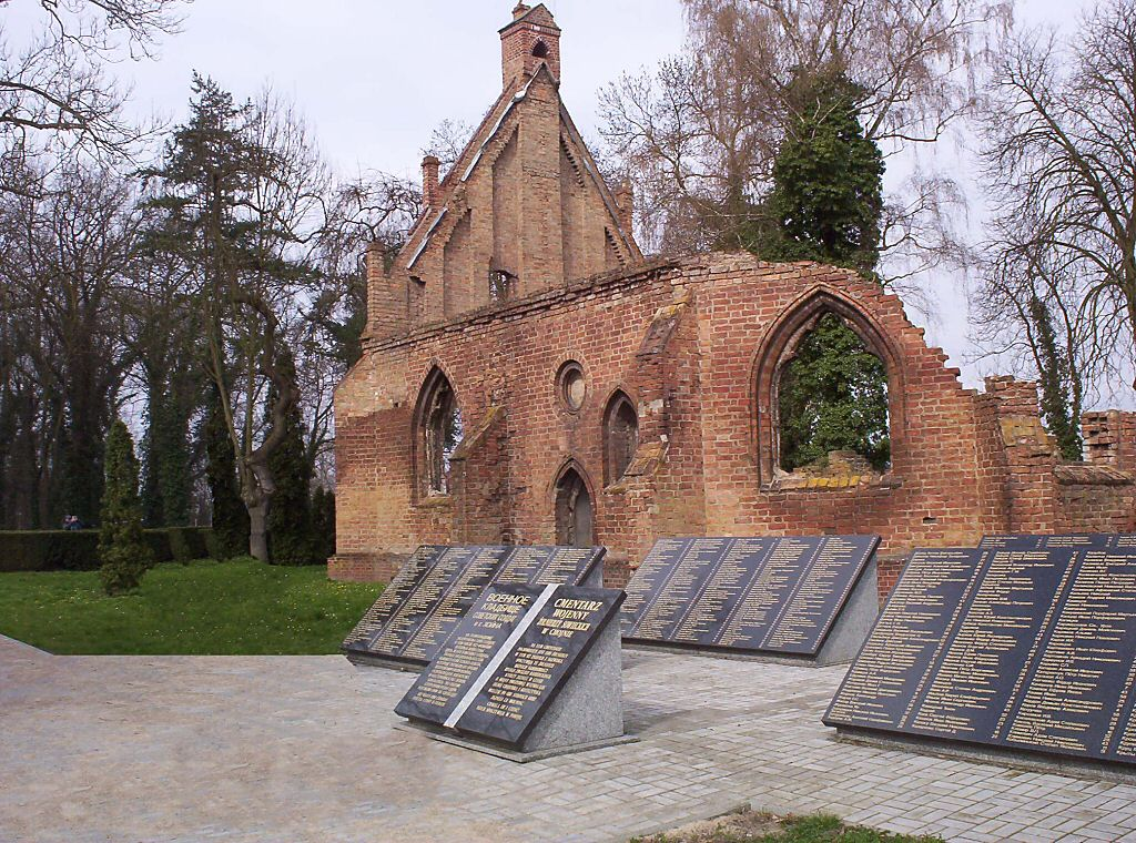 Chojna - ruiny kaplicy św. Gertrudy na cmentarzu żołnierzy radzieckich